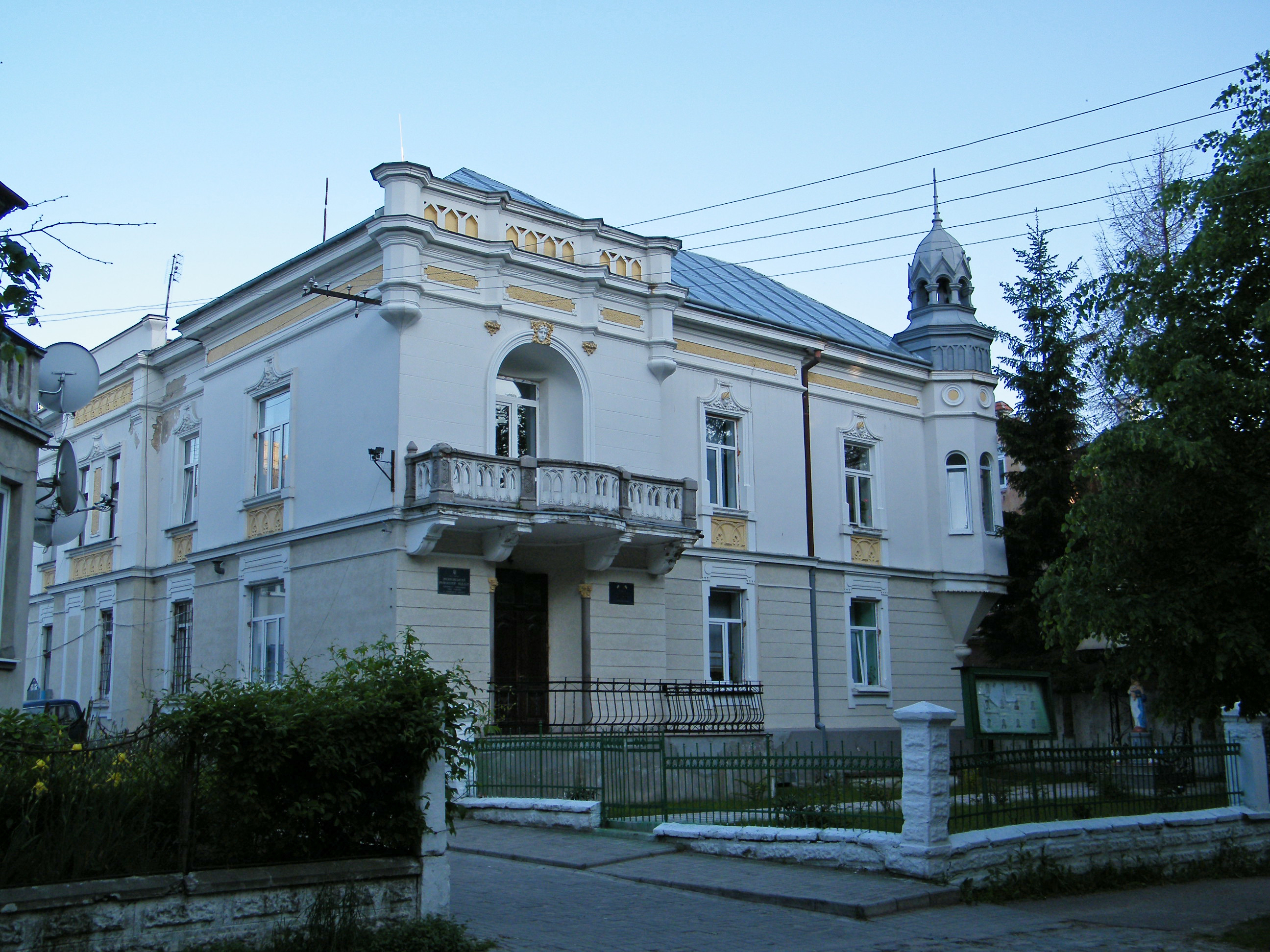 Особняк рядом с парком